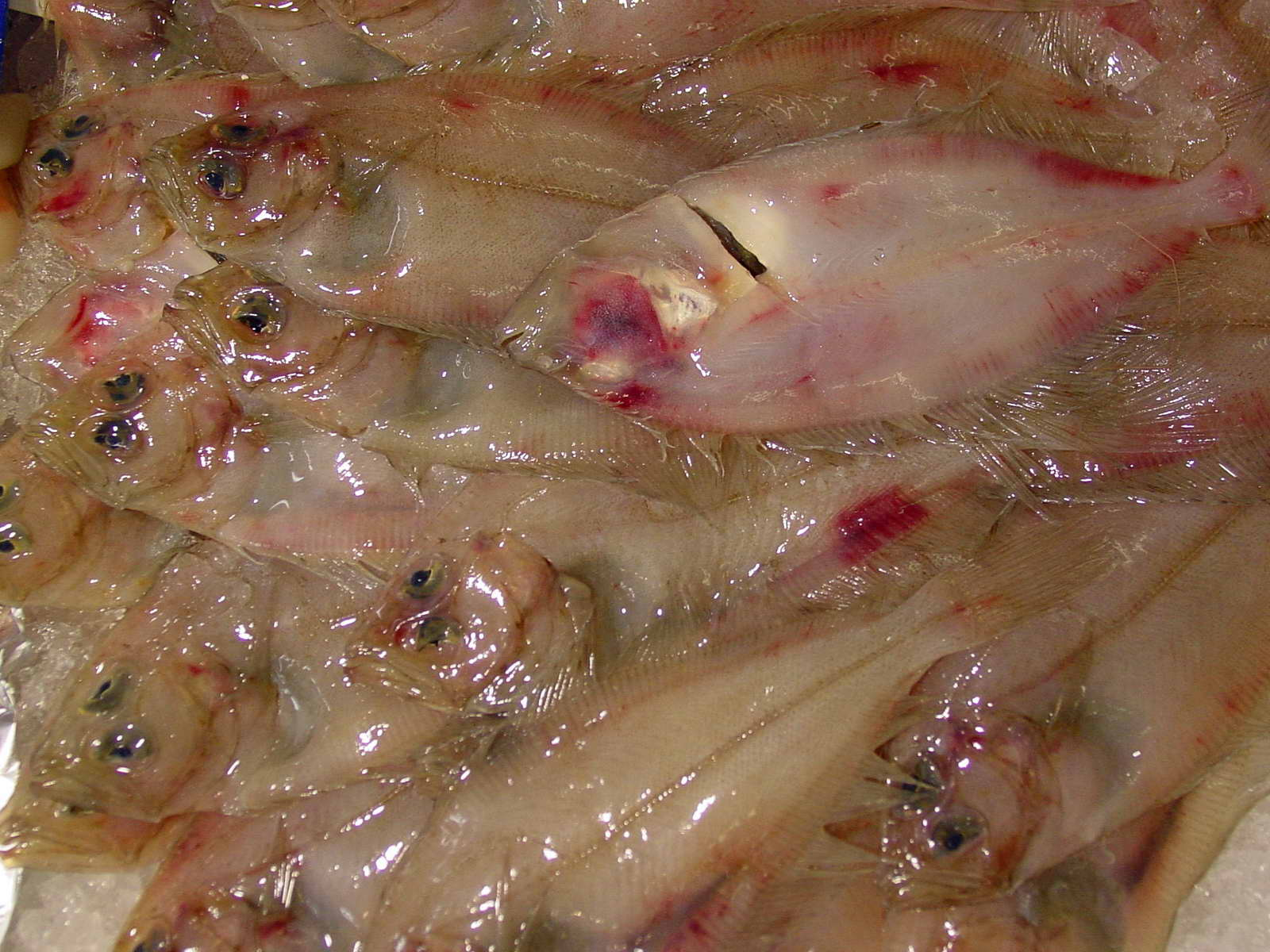 Meiga ou rapante